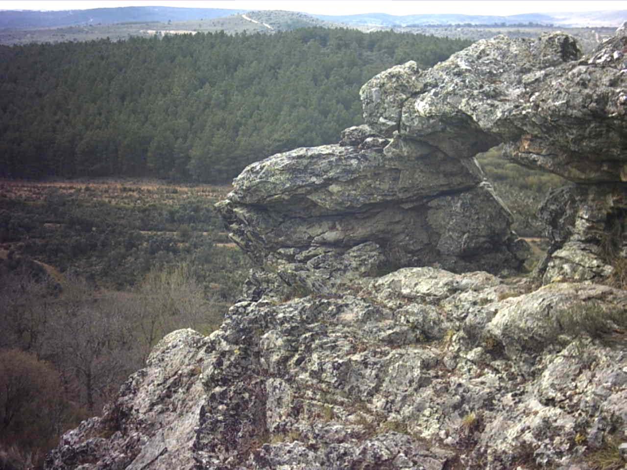 Sierra de la Culebra: La Peña Furada en Gallegos del Campo.